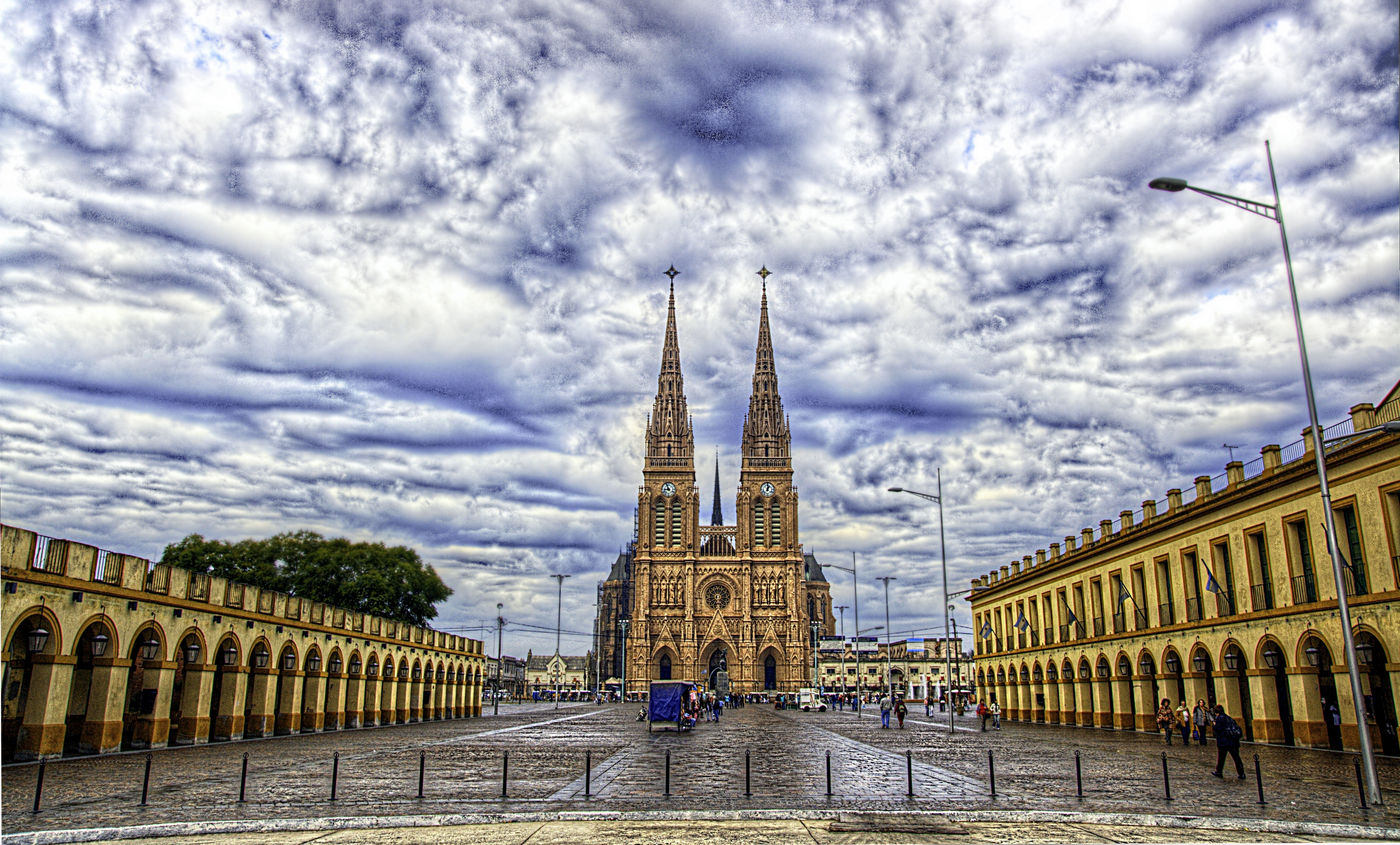 Basílica de Nuestra Señora de Luján, Luján, provincia de Buenos Aires, Argentina.